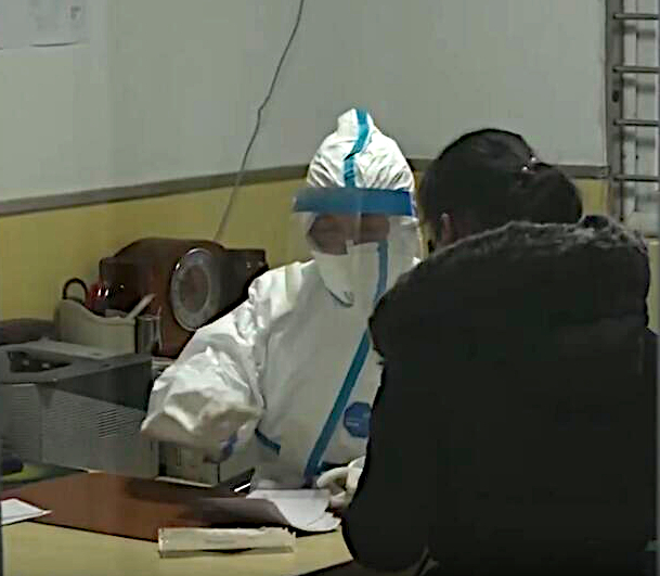 湖北省中医院一位身穿防护服的医生给患者看病